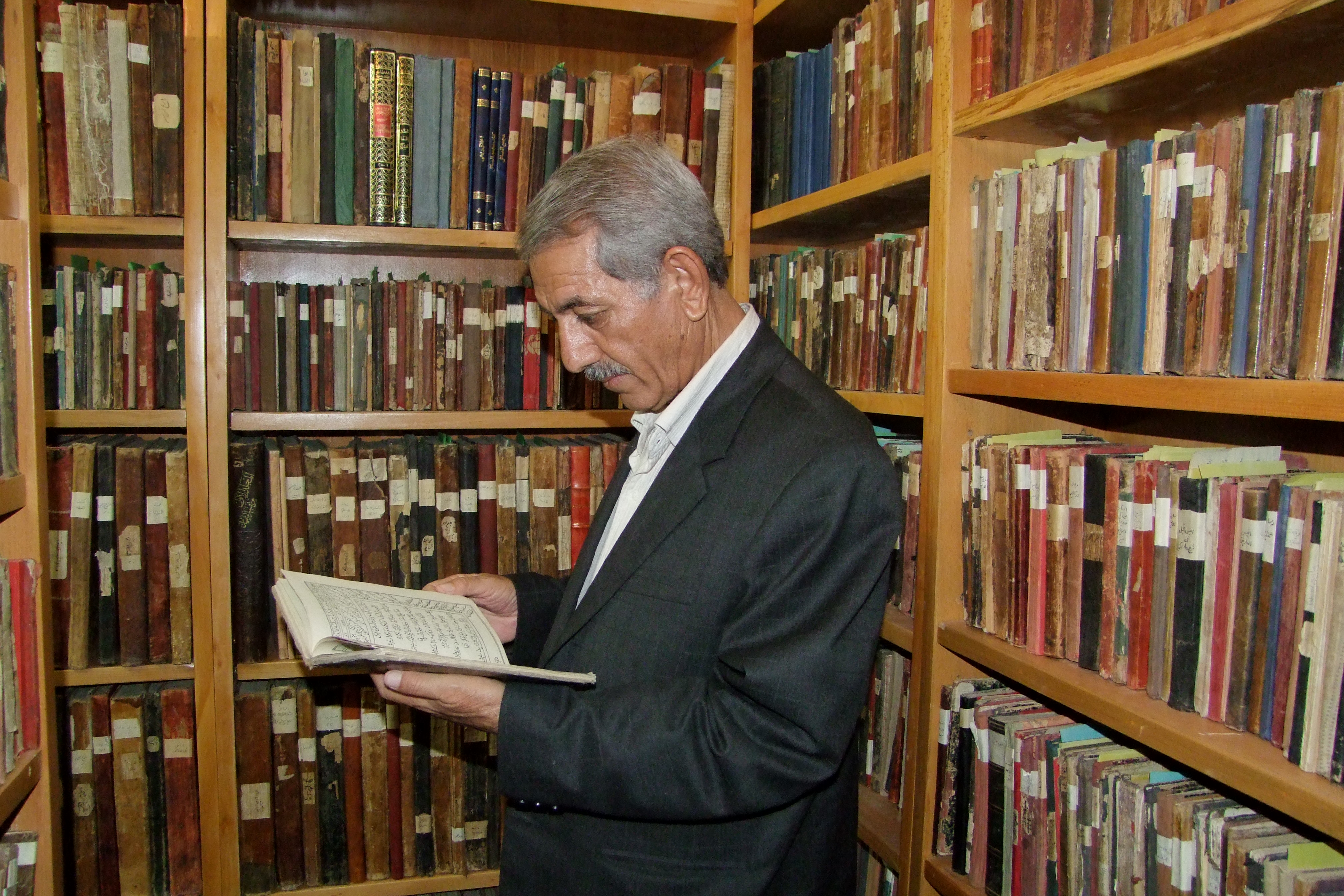 تۆرکجه: اسدالله مردانی رحیمی